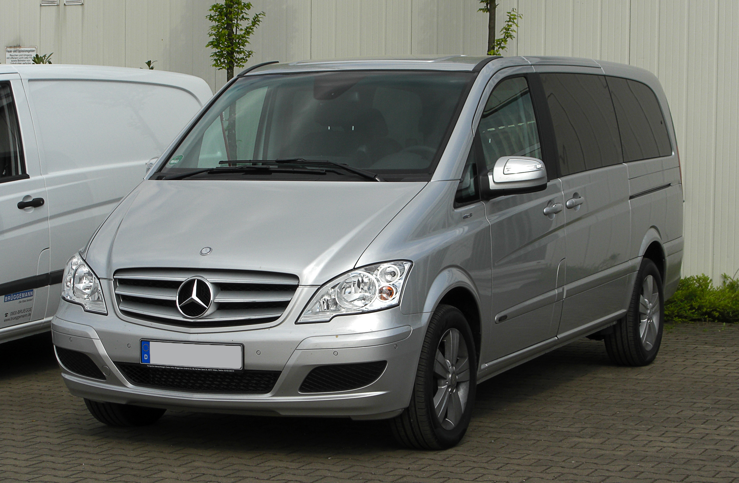 Mercedes-Benz Viano Lang CDI 2.2 BlueEFFICIENCY Trend Edition (V 639, Facelift)